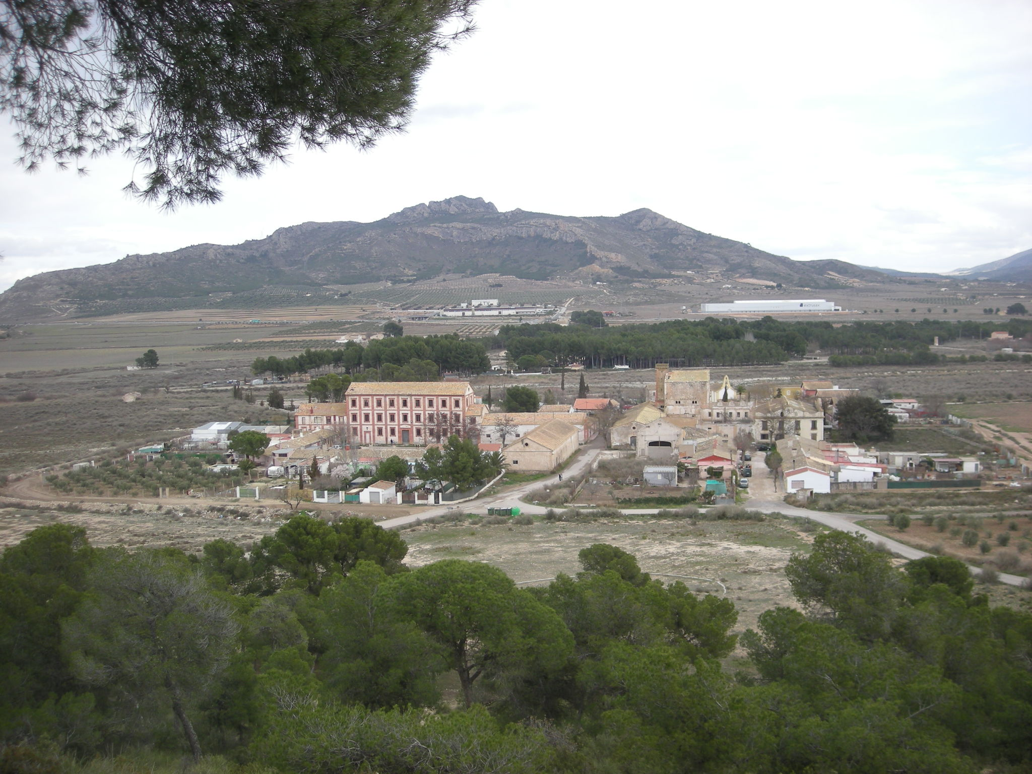 Fotografía de la Colonia de Santa Eulalia desde lo alto del cerro